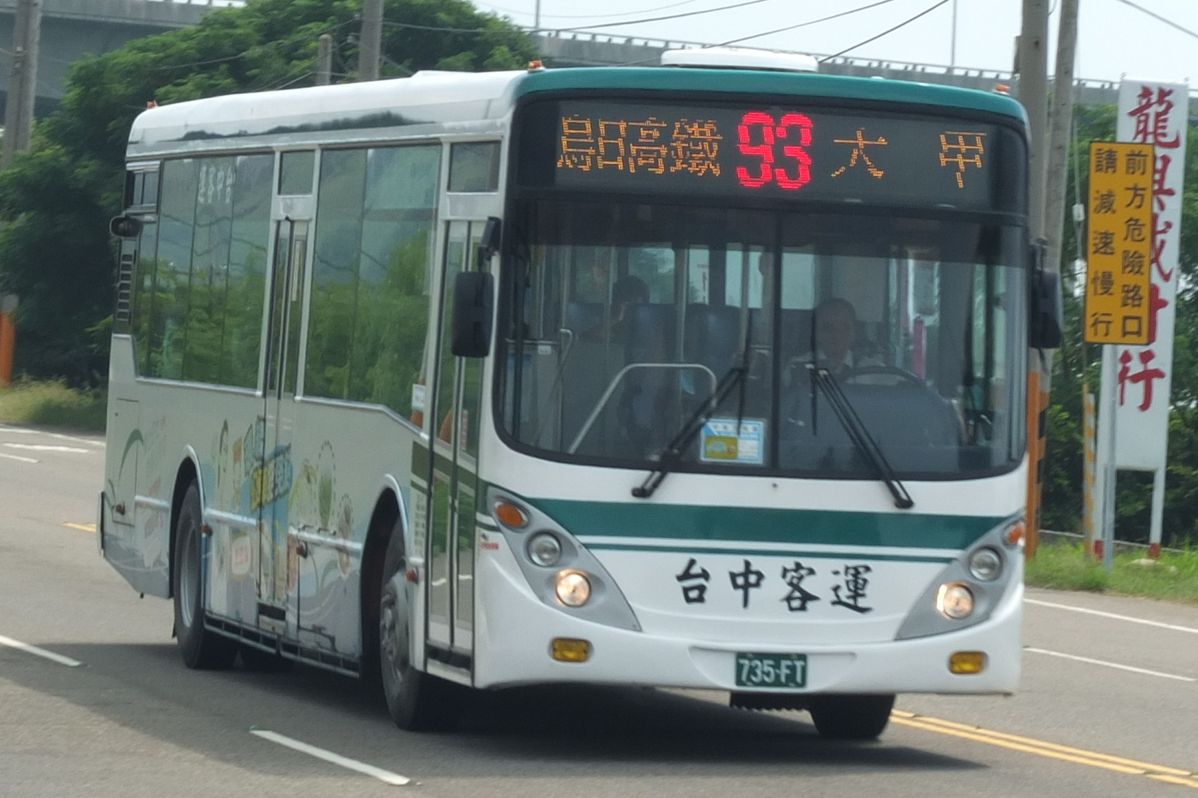 台中客運大客車735-FT營運台中市公車93路，行駛於台中市清水區中山路甲南一帶。本車為HINO ERK2JRL，日盈車體，原台北客運車輛。